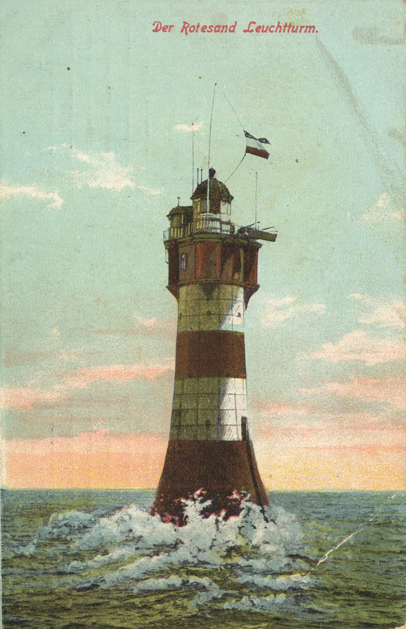 Der Rotesand Leuchtturm.